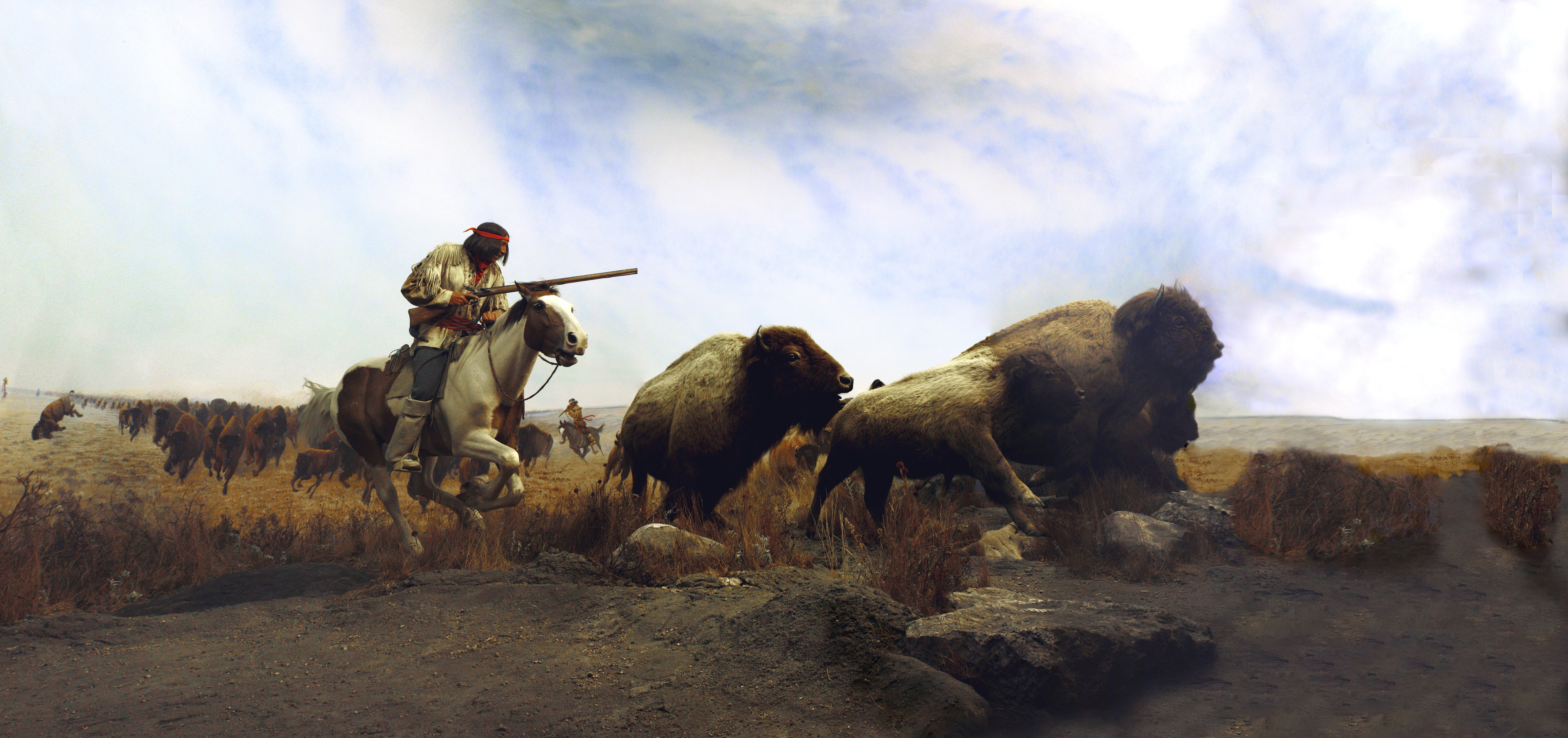 Manitoba Museum, Winnipeg, Canada